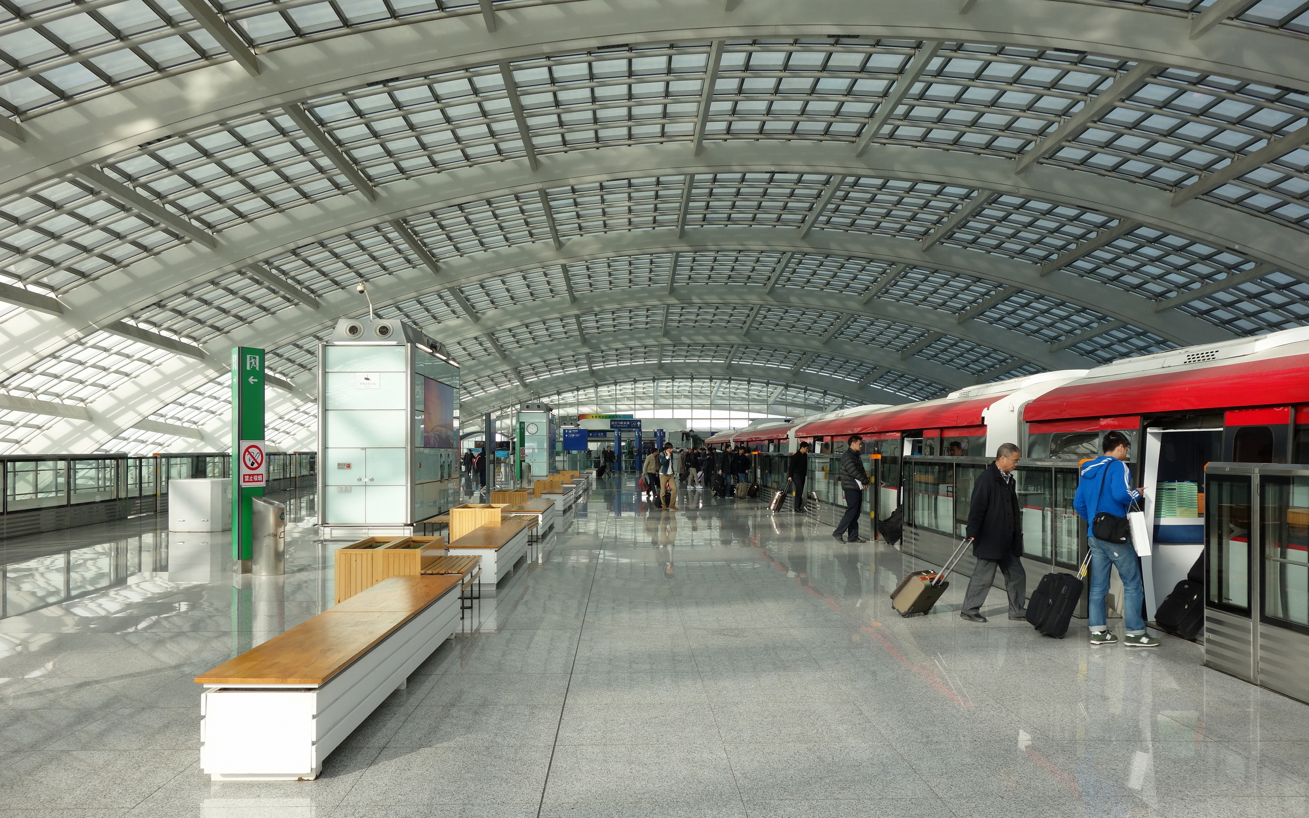 机场线3号航站楼站站台